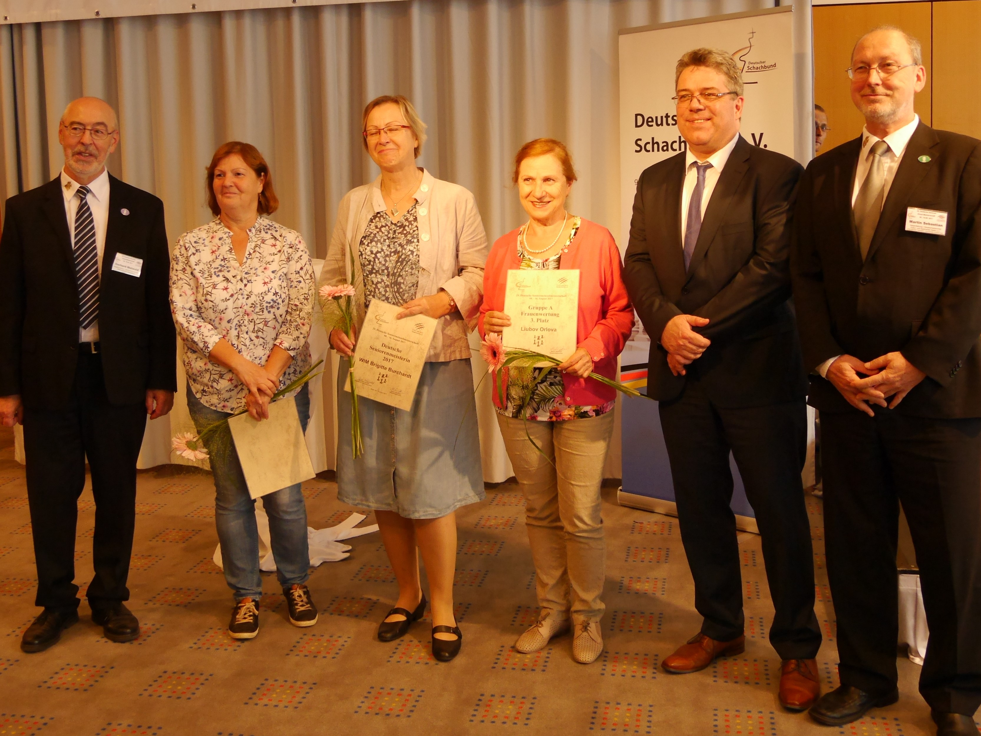 Siegerehrung der drei besten Frauen der deutschen Seniorenmeisterschaft im Schach 2017. Von links nach rechts: Gerhard Maiwald, Annett Wagner-Michel (2.), Brigitte Burchardt (1.), Liubov Orlova (3.), Ullrich Krause und Martin Sebastian.